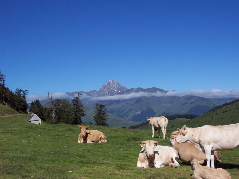 Vue du Pic du Midi. Photo prise sur le col d'Aspin